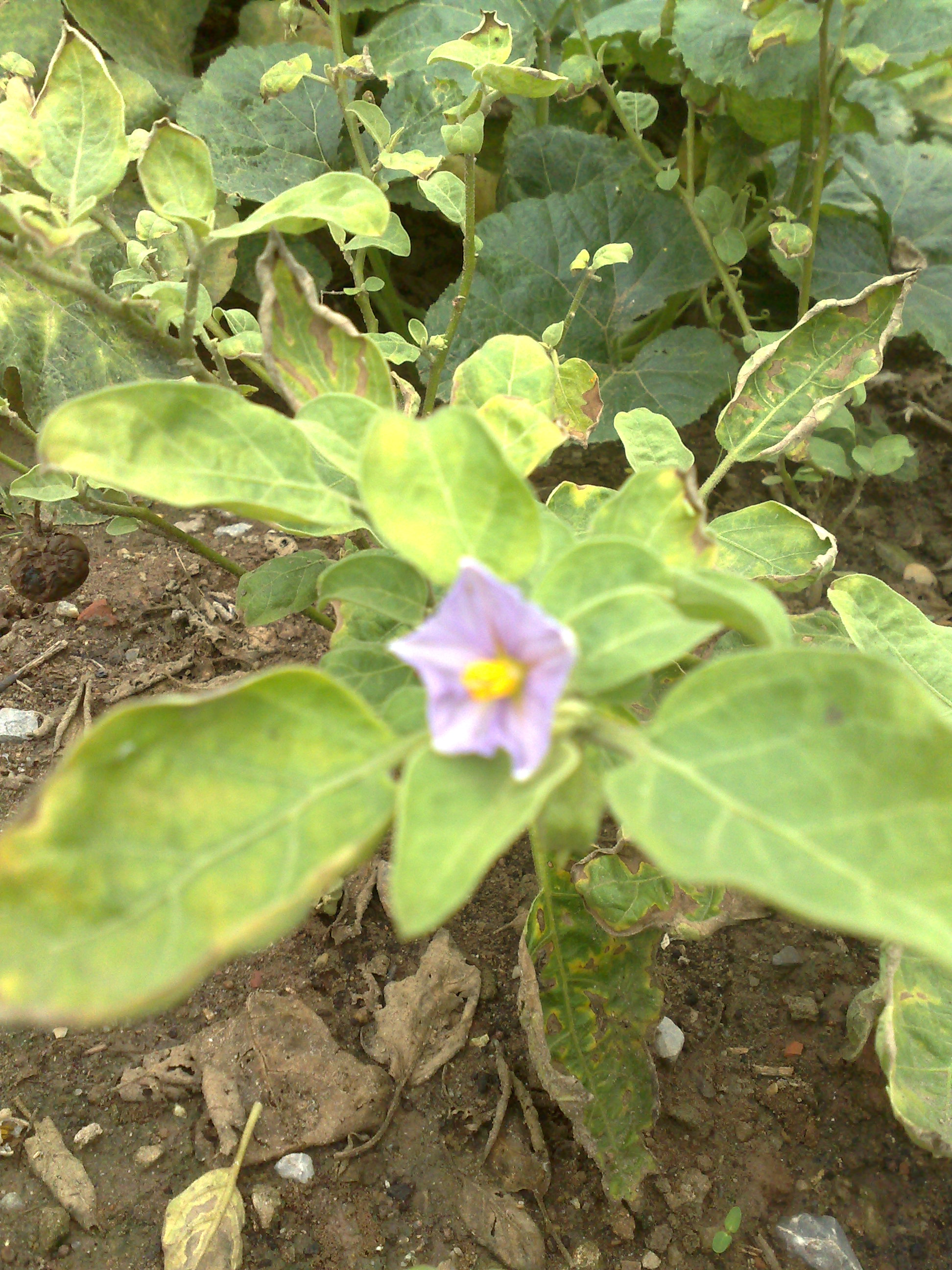 Hình chụp hoa cà pháo do tôi tự chụp và tải lên để minh hoạ cho bài viết Cà pháo.